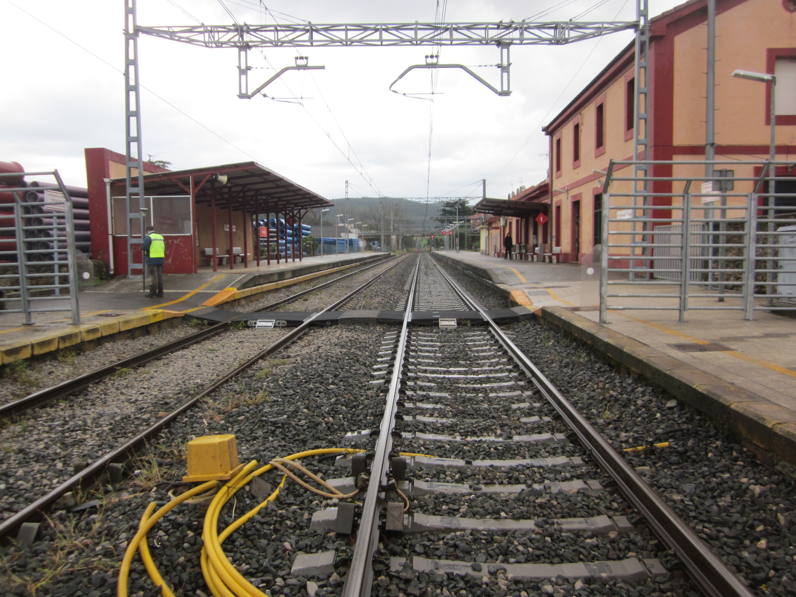 Vista de la estación de Renedo (Cantabria) en 2014.